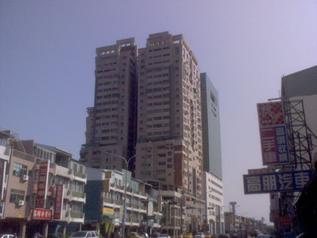 臺南國寶與永樺企業家大樓